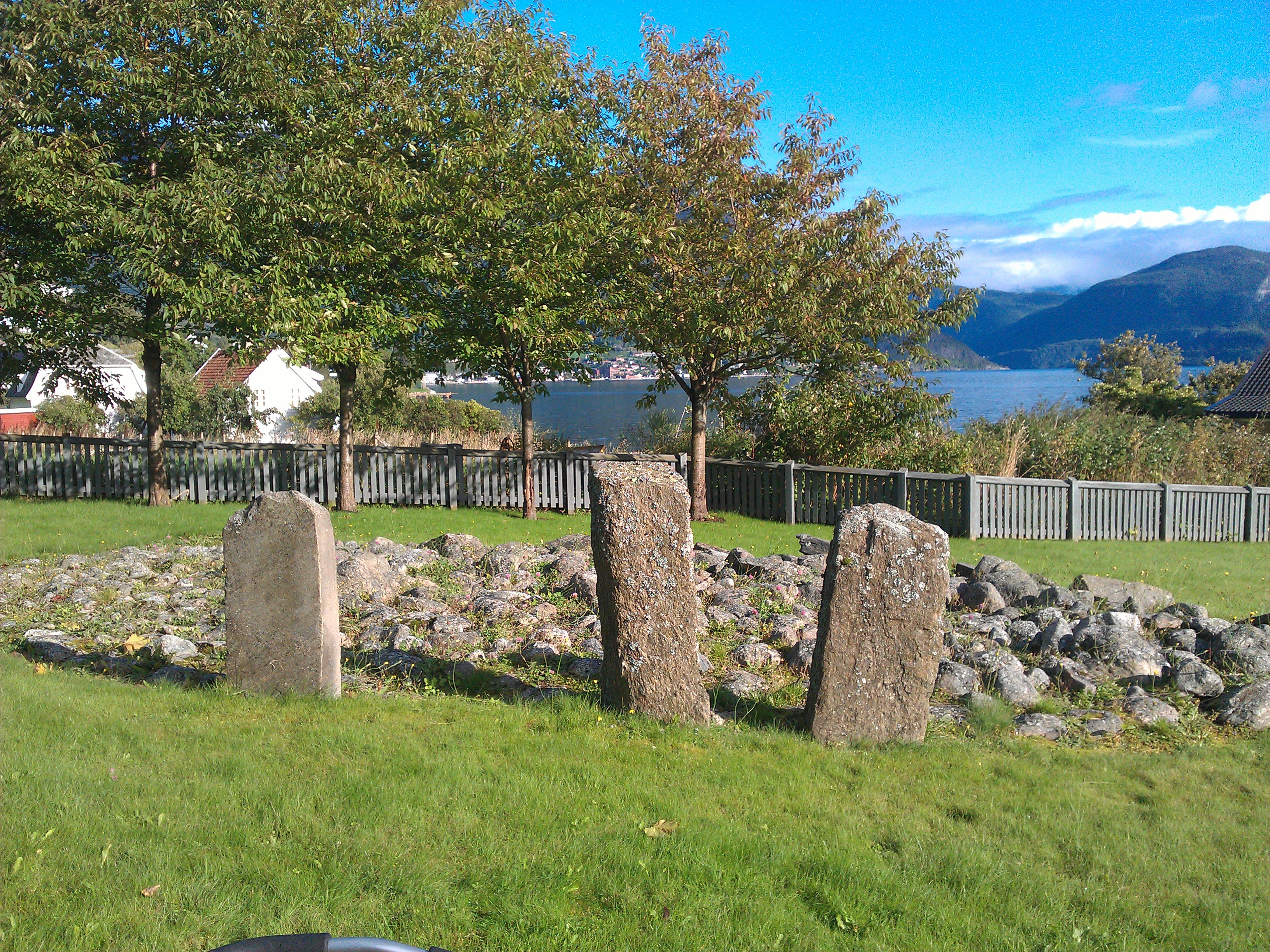 Dette er ei av fleire gravrøyser som vart avdekka på 1990-talet. Fleire rike funn vitnar om at det har budd mektige folk på tufta heilt frå bronsealderen. I Baldershagen finn ein også bautasteinen kalla Baldersteinen.